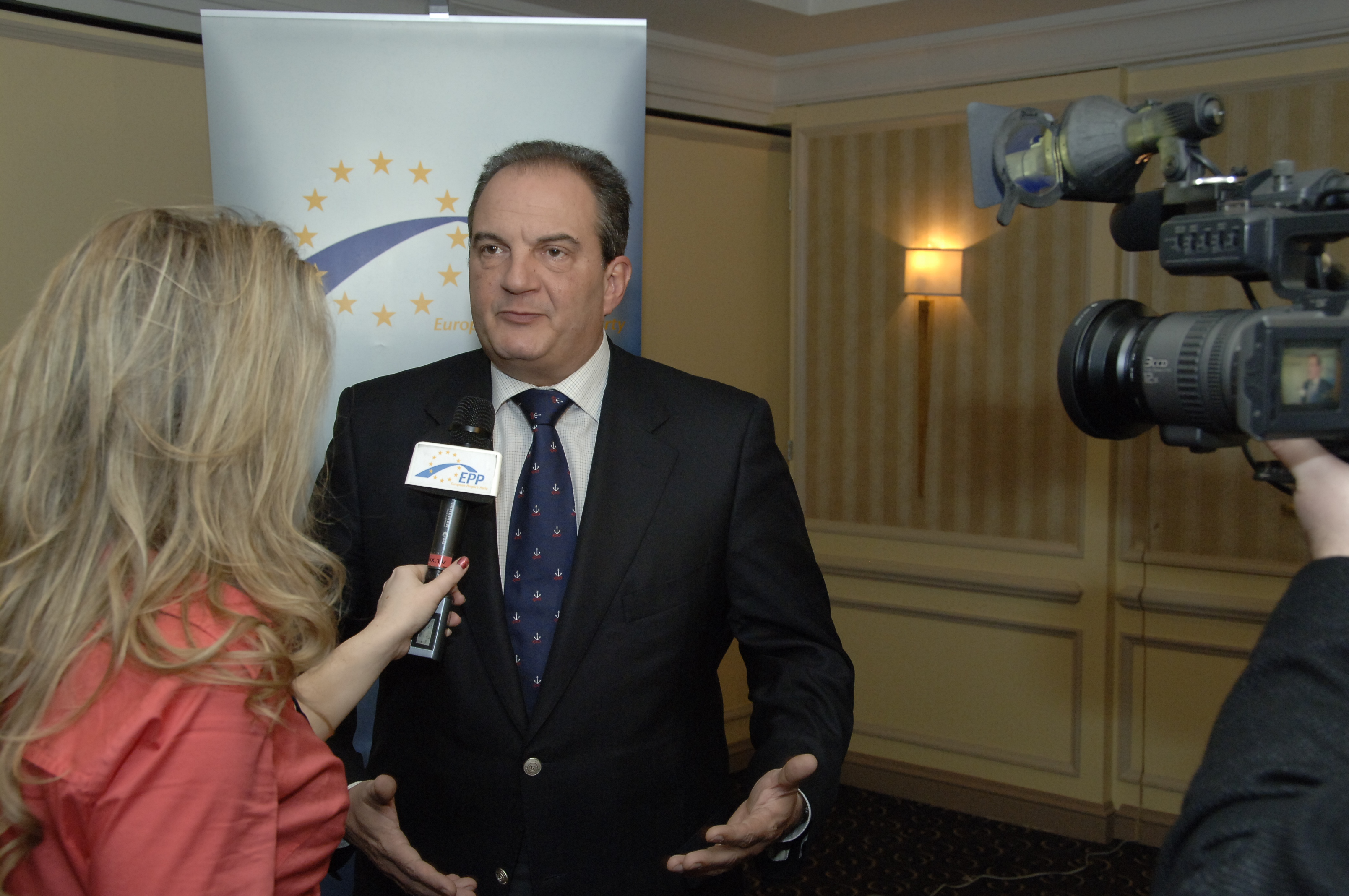 Karamanlis5